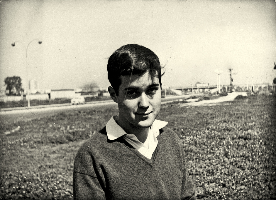 מני פאר בגני התערוכה, 1965